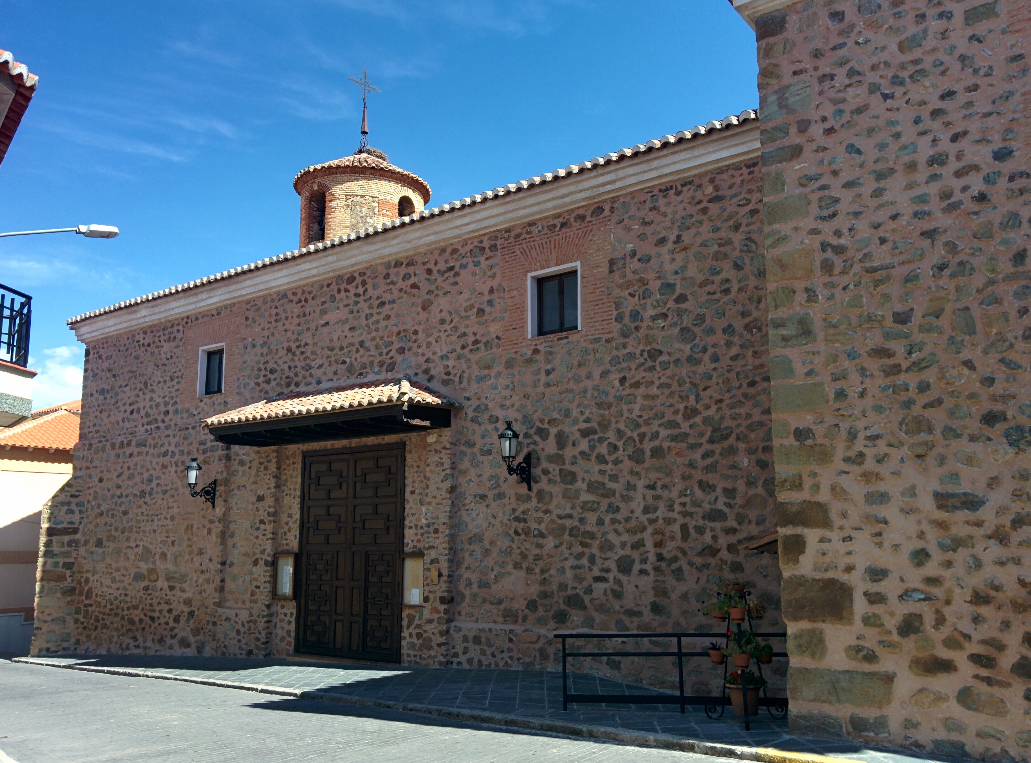 Iglesia de Santa Quiteria, Fuente el Fresno (Ciudad Real, España).